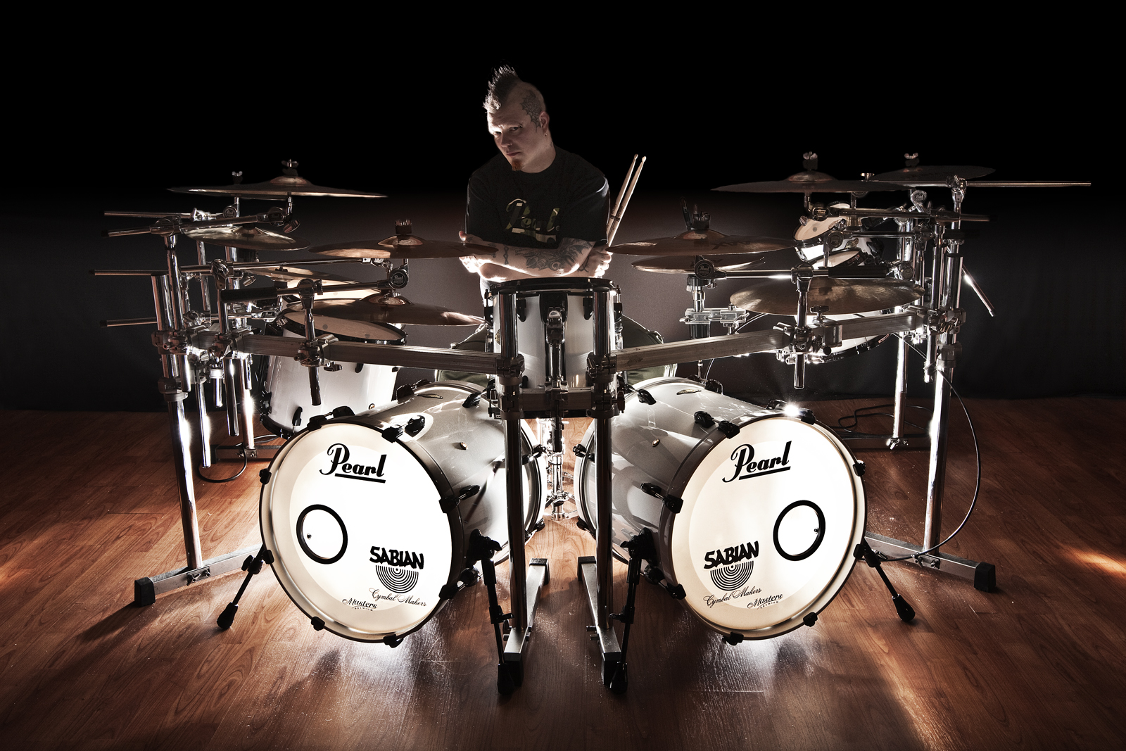 Description